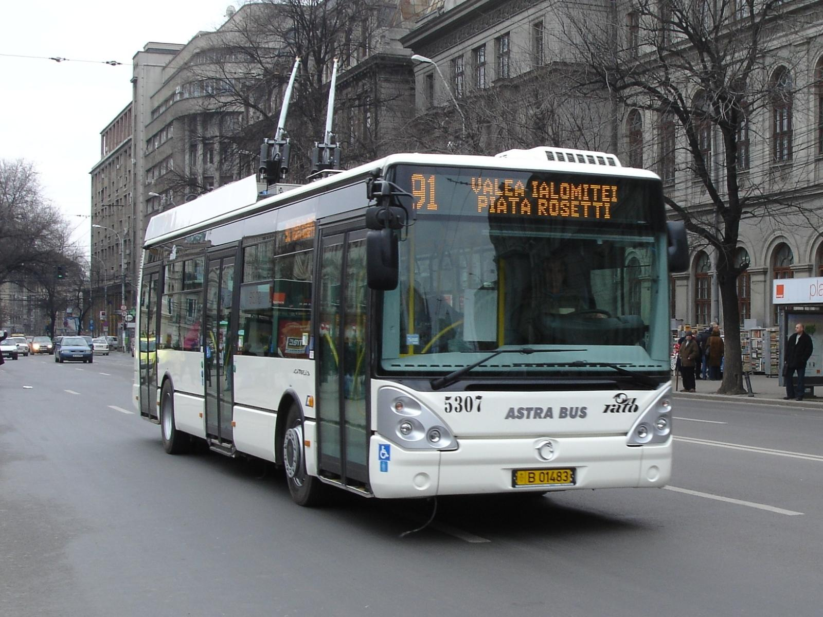 Troleibuz IVECO-Citelis produs la Astra Arad. Troleibuze de acest tip apartin depourilor Bujoreni si Vatra Luminoasă.